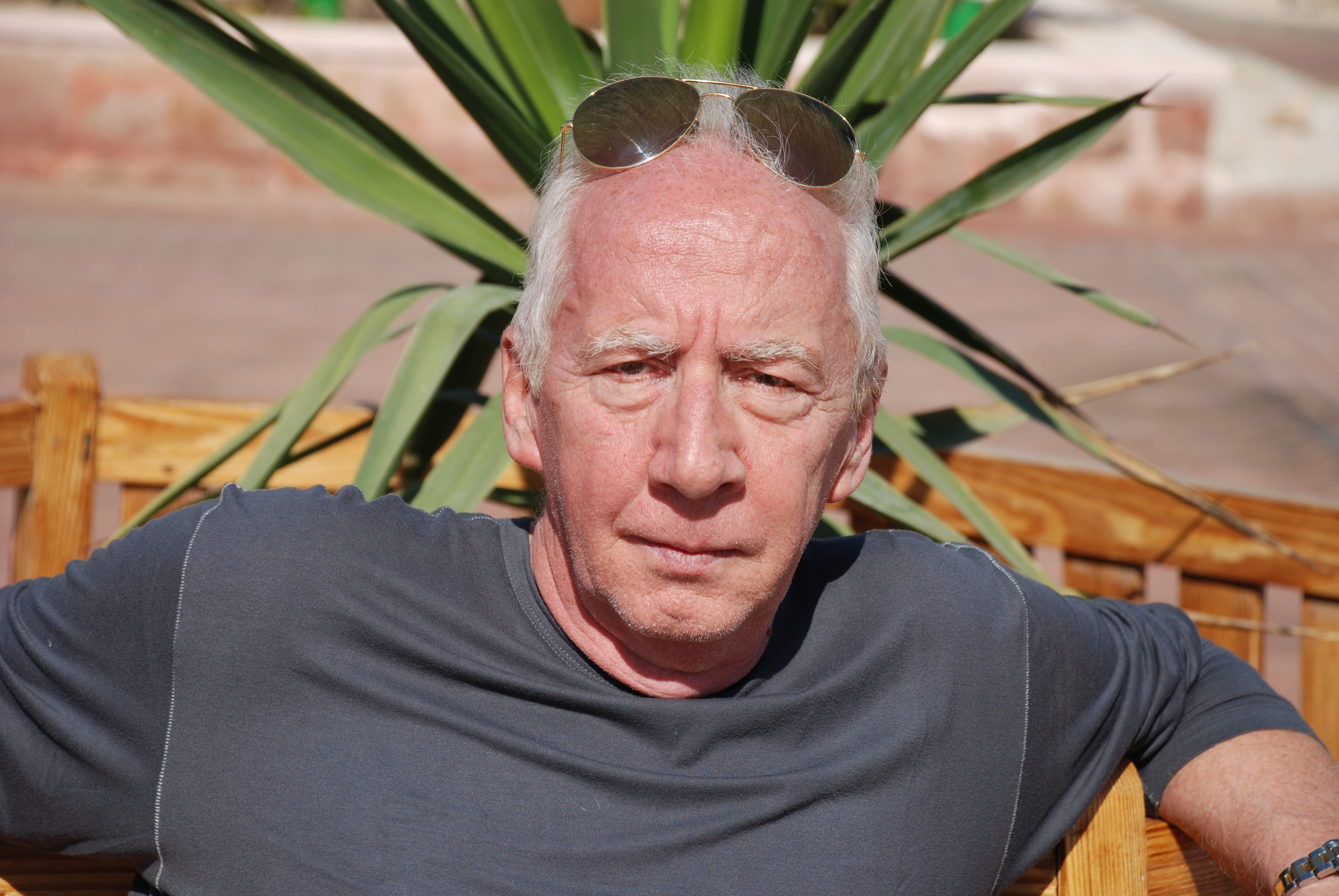 Immagine del paroliere ed autore di programmi televisivi Cristiano "Popy" Minellono. Immagine scattata dalla moglie dell'autore e messa a disposizione dallo stesso, per mio tramite, dei progetti Wikimedia (vedi: Cristiano Minellono).